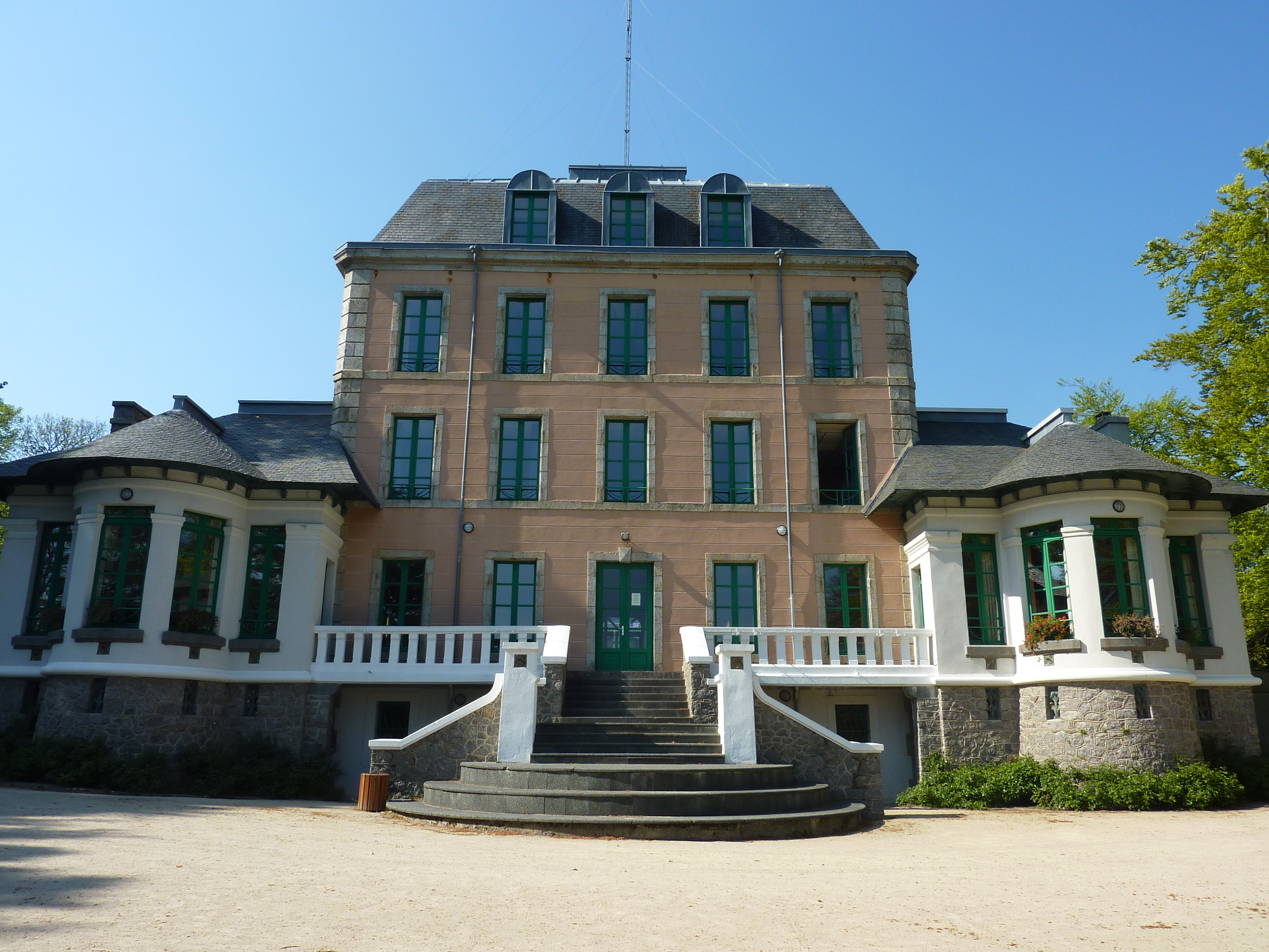 Le Relecq-Kerhuon : le manoir du Gué Fleury, actuellement siège du CIEL (Centre international d'études de langues)